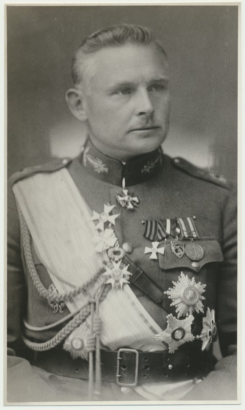 kindralmajor Juhan Tõrvand. VM VMF 407:271 F, Viljandi Muuseum.